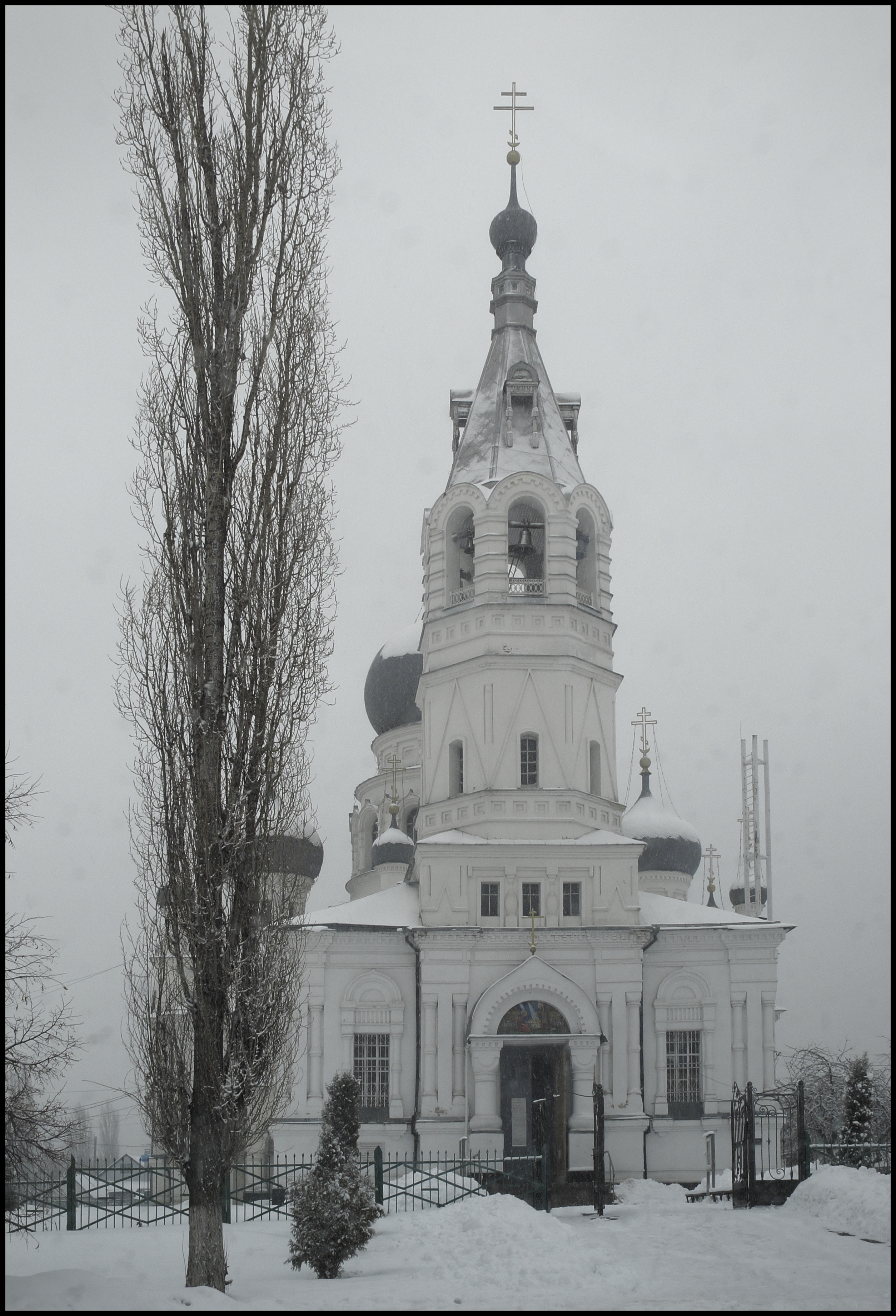 Рождественская церковь / Воздвижения креста: Анна, Аннинский район, Воронежская область